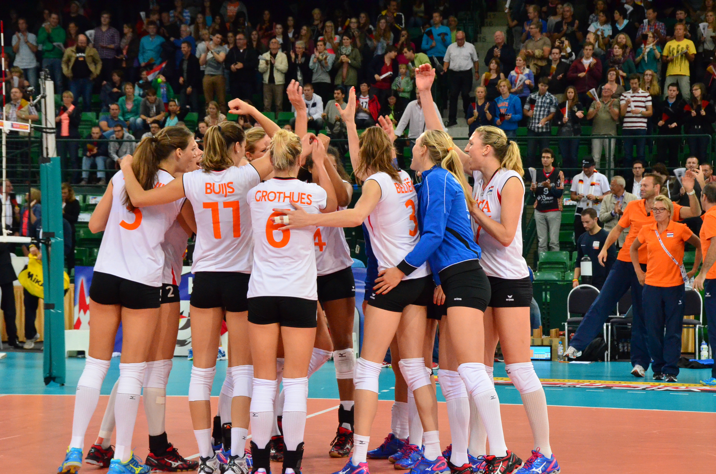 Volleyball-Europameisterschaft der Frauen 2013-Spielort Halle (Westf) Gerry-Weber-Stadion - Spiel 8. September 2013 (Spanien-Niederlande)